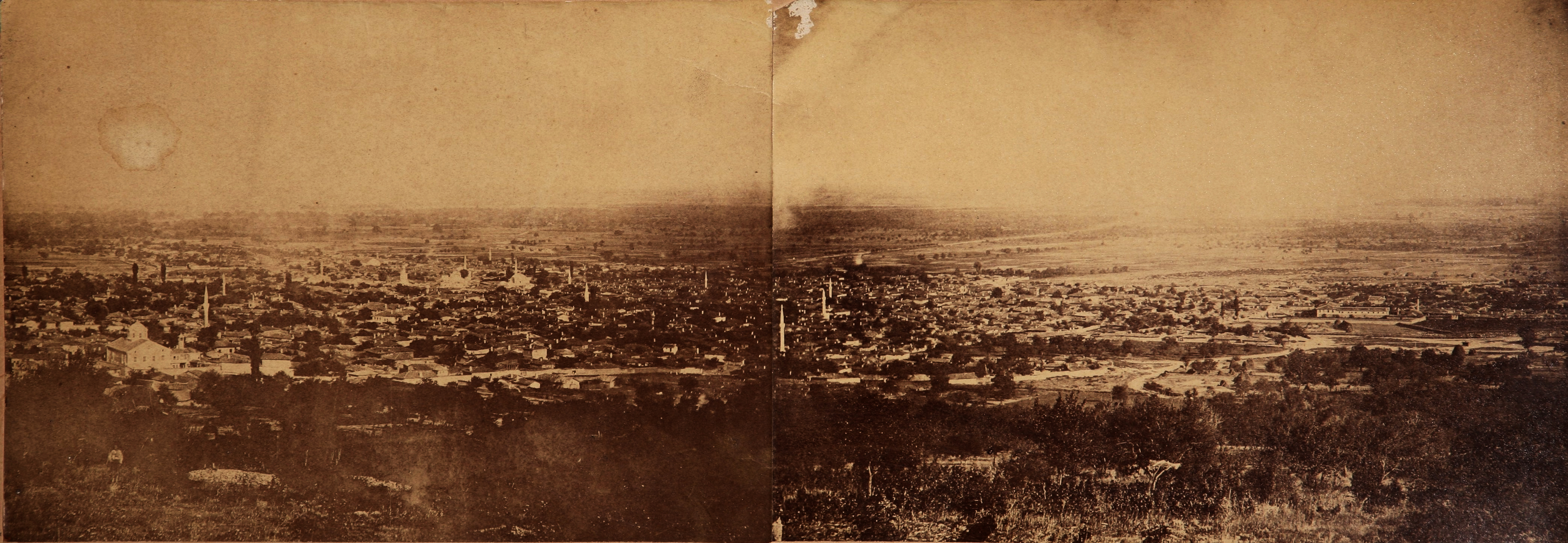 Панорамна снимка на Стара Загора от 1876-та година. По онова време това е най-големият град в България.